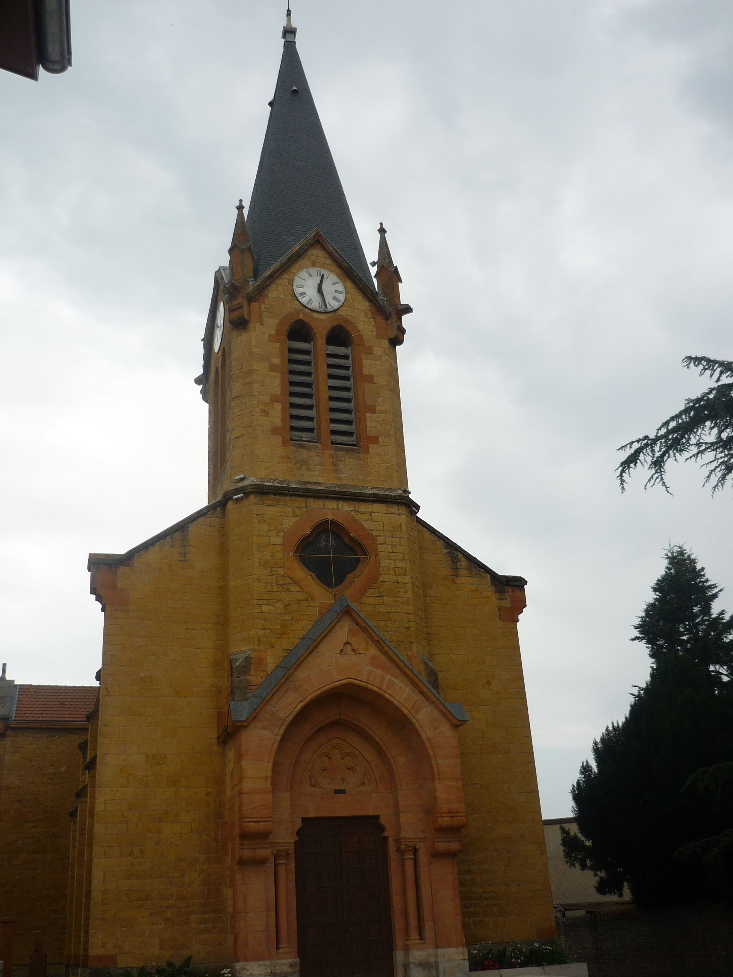 Église de Civrieux-d'Azergues, dans le département du Rhône